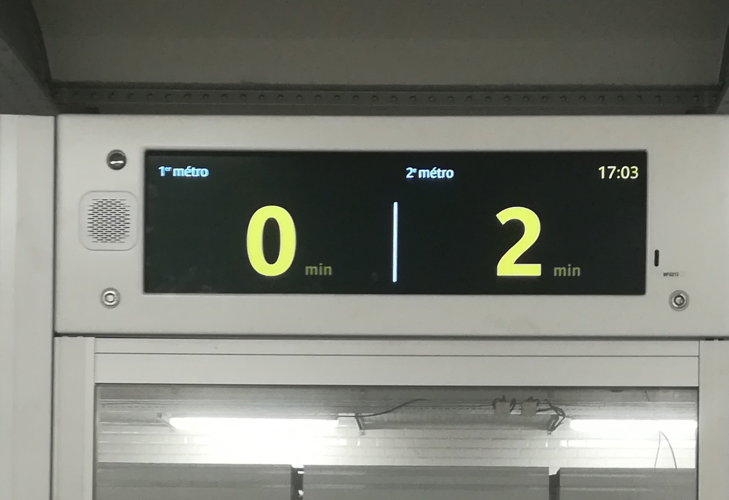 Un panneau SIEL installé sur les portes palières de la ligne 4 du métro de Paris.